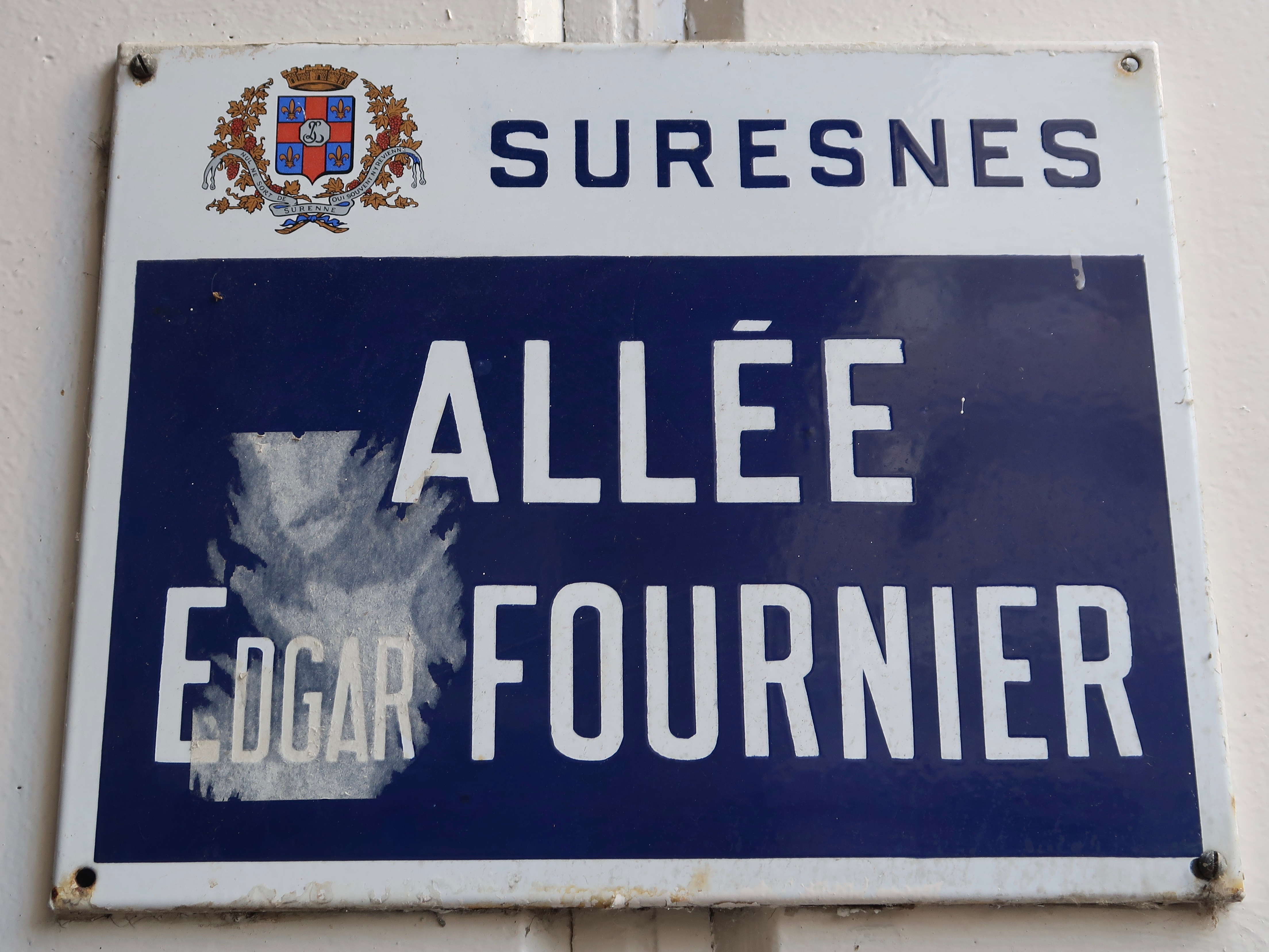 Plaque de l'allée Edgar-Fournier à Suresnes (Hauts-de-Seine).